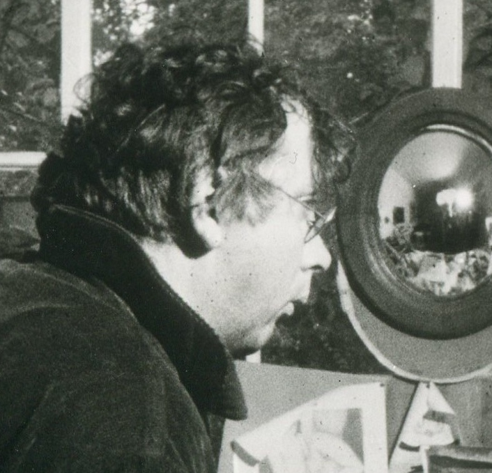 Horst Janssen in seinem Atelier in Hamburg-Blankenese